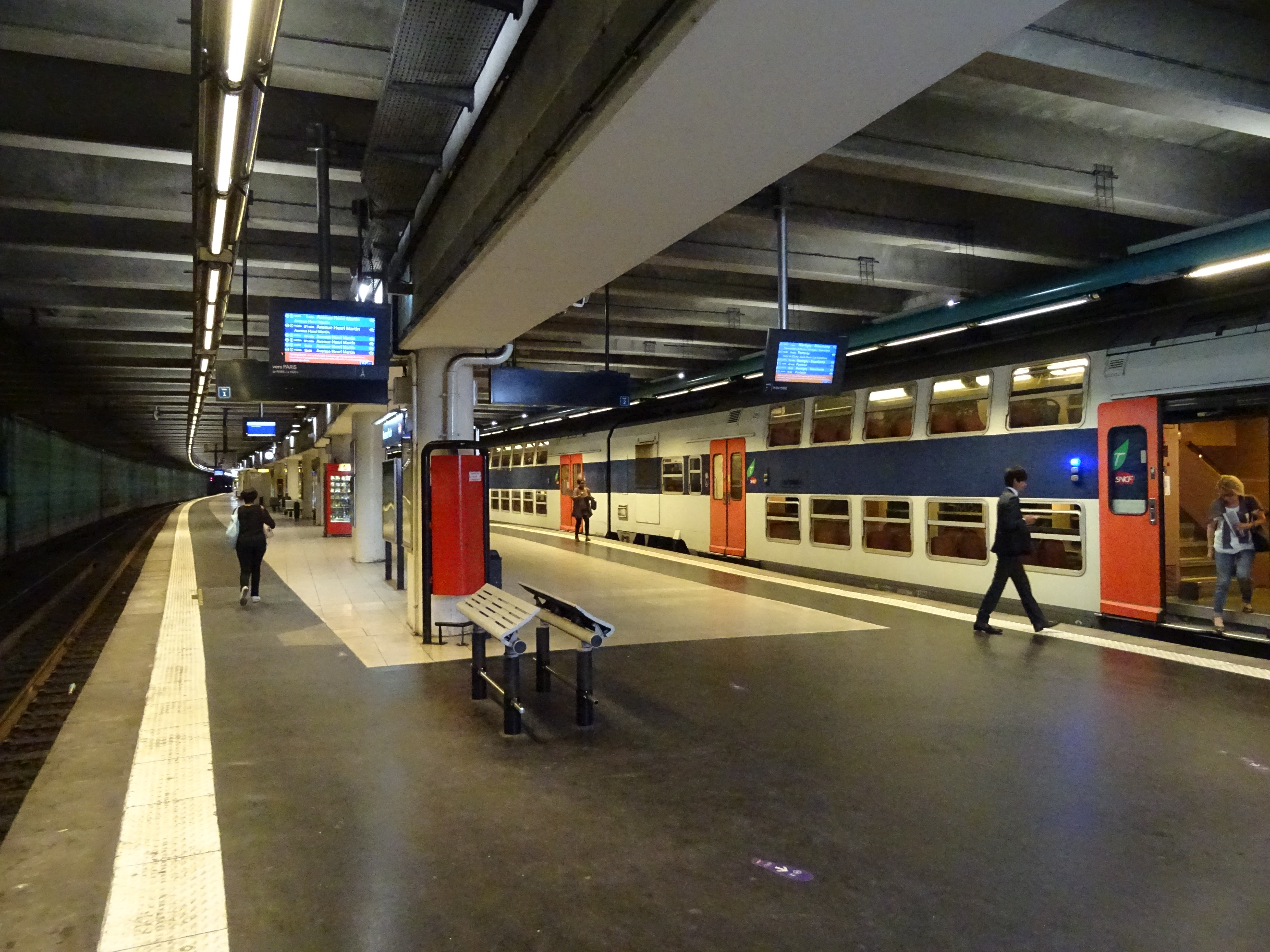 Train à quai gare de l'avenue Foch